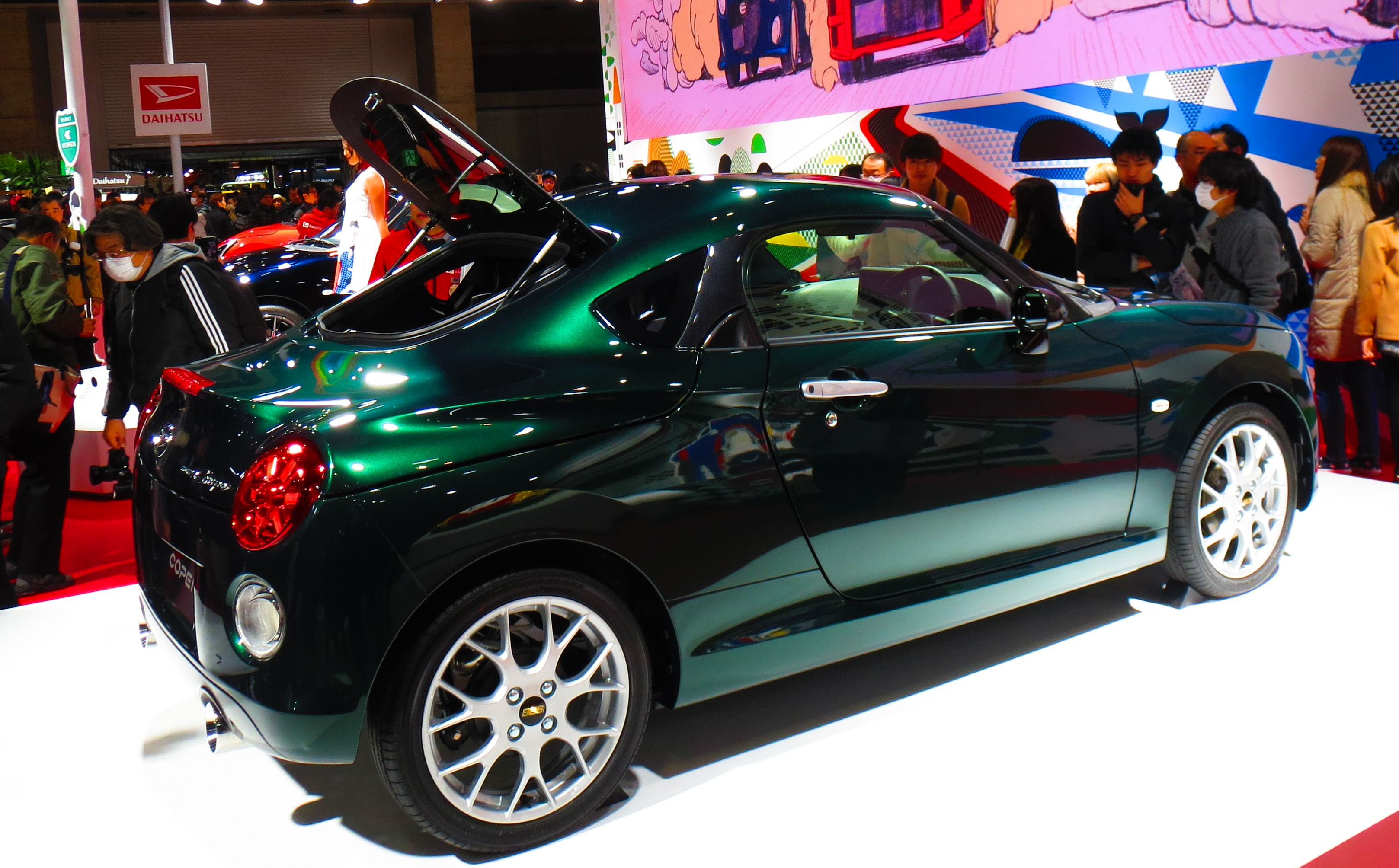 ダイハツ・コペンクーペ 東京オートサロン2019出展車